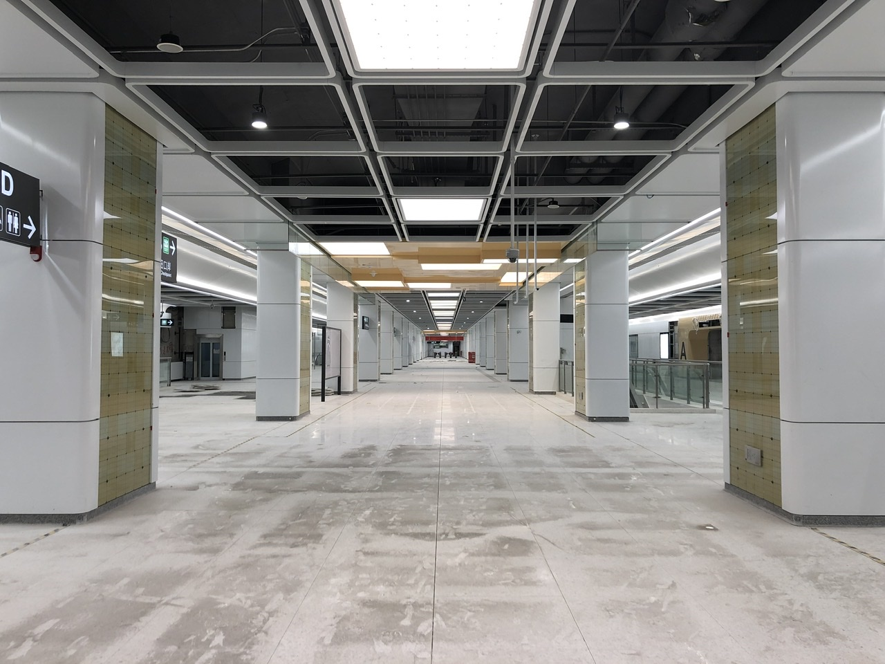 冬瓜岭站站厅